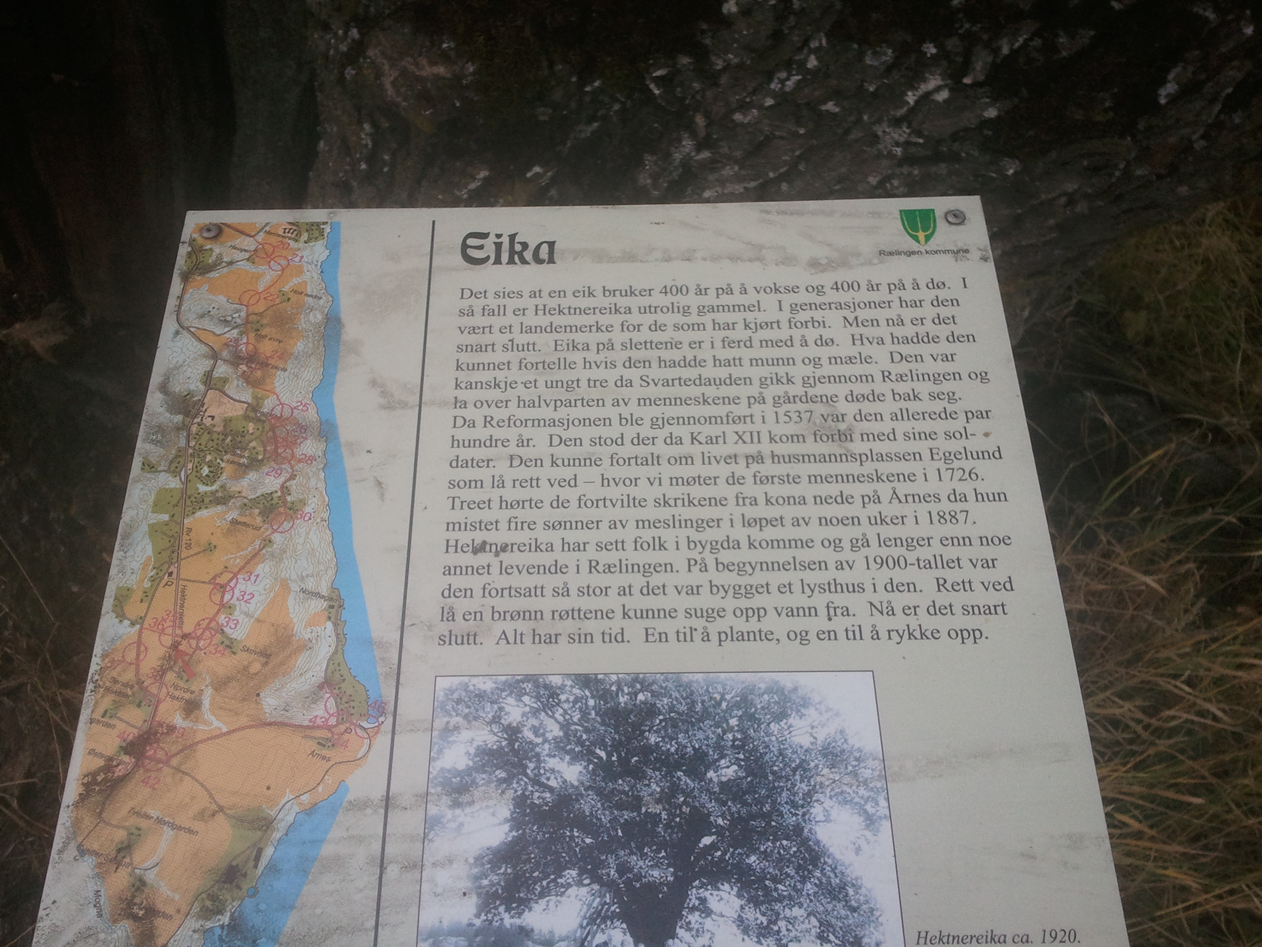 Informasjon oppslått ved eika.